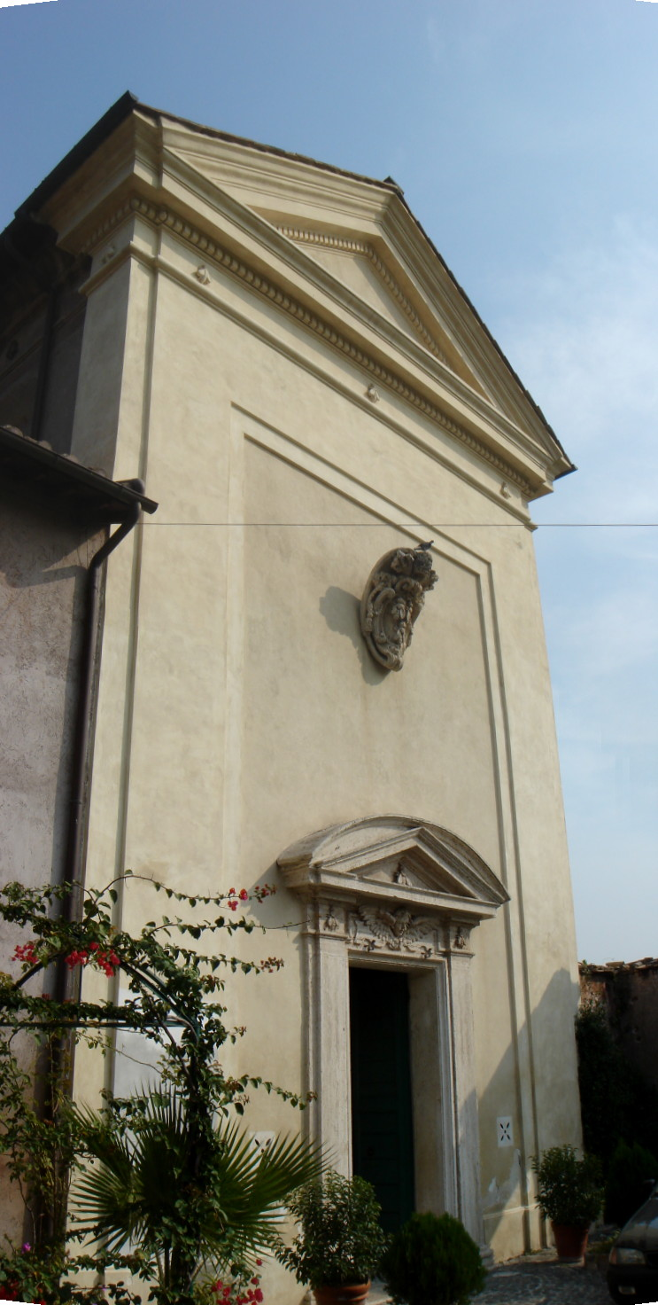 Roma, San Sebastiano al Palatino: facciata